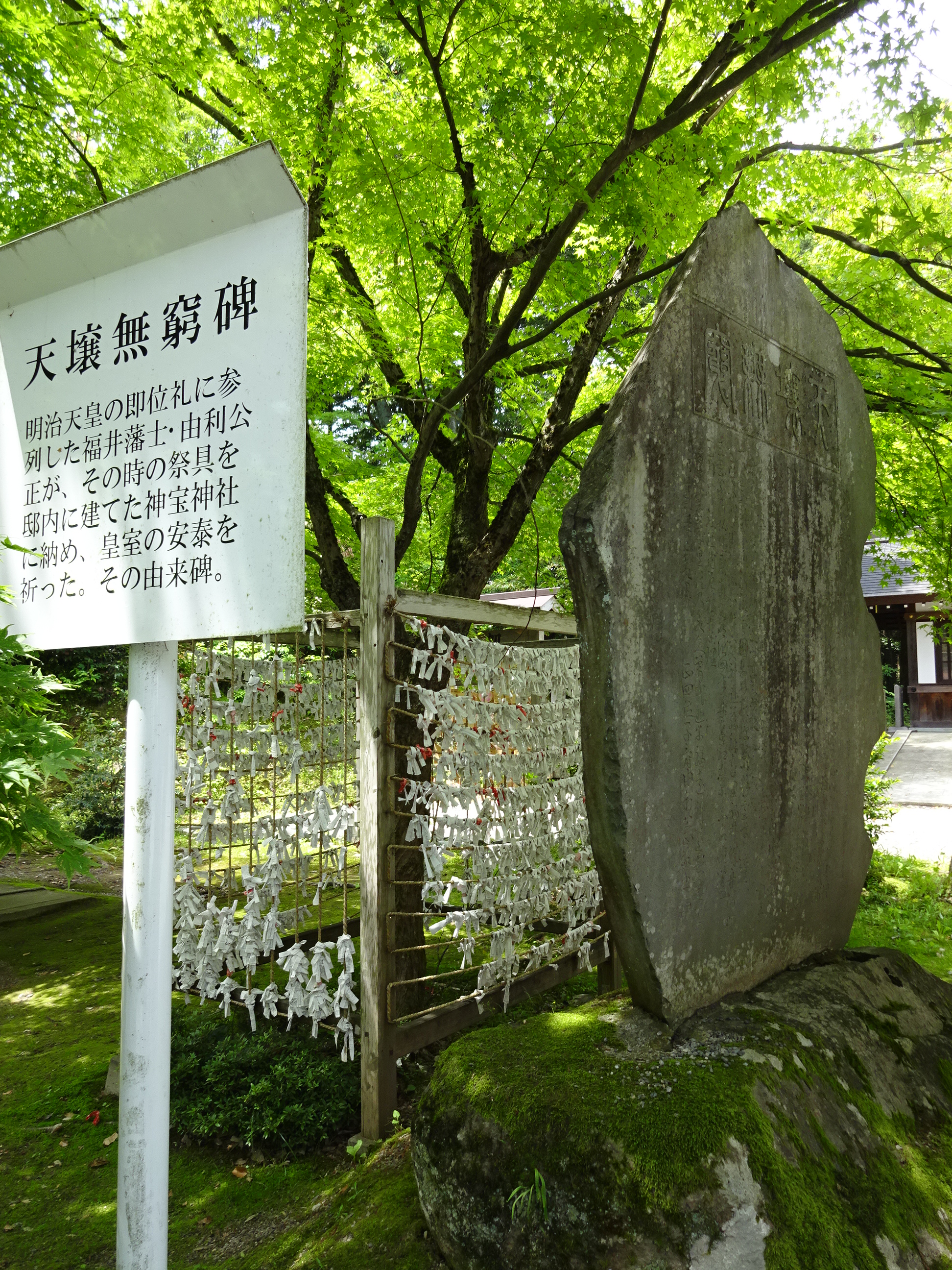 天壌無窮碑